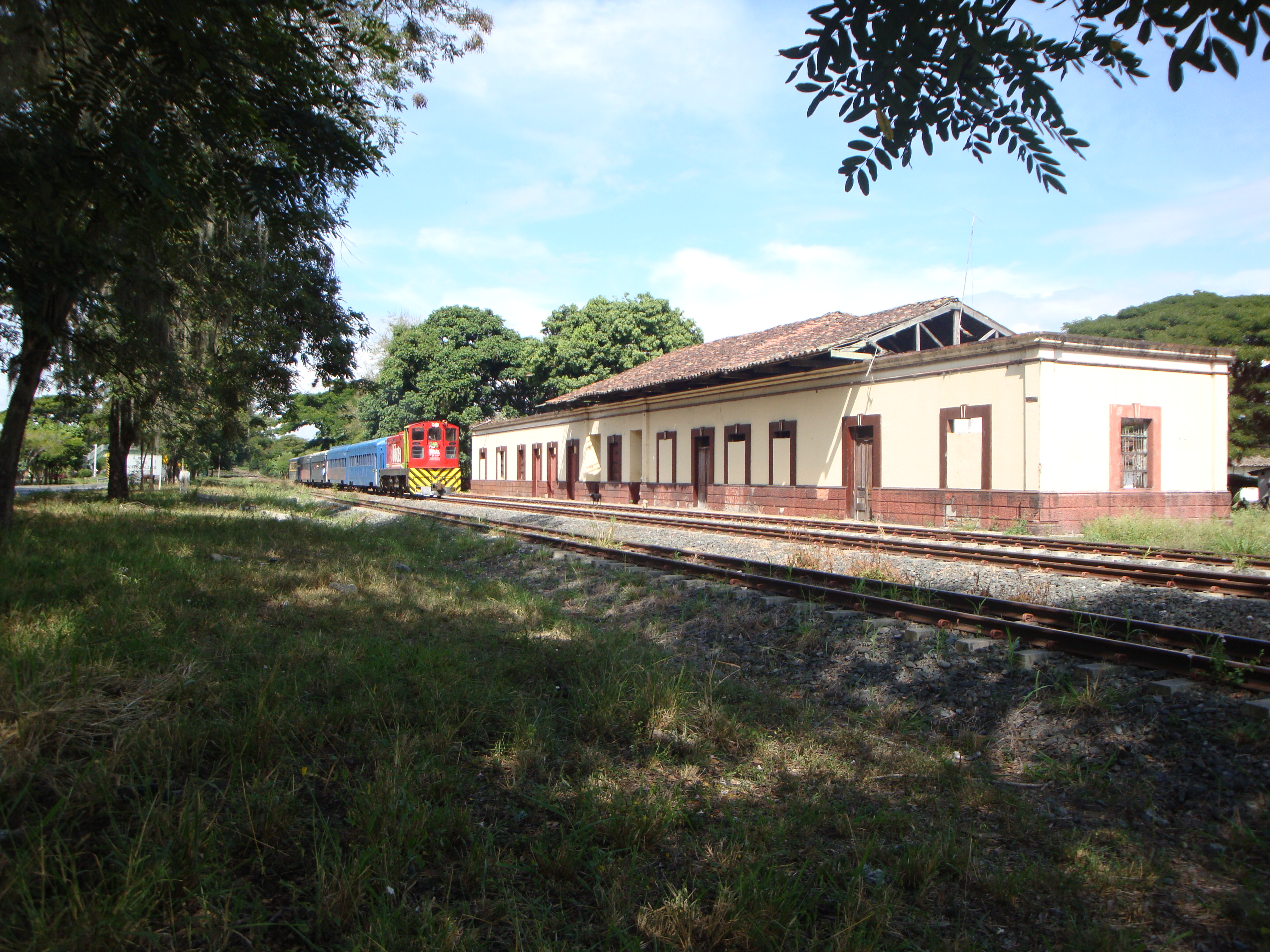 Estacion del tren de Bugalagrande ubicado entre las carreras 1 y 5 de Bugalagrande, entrada norte del municipio.